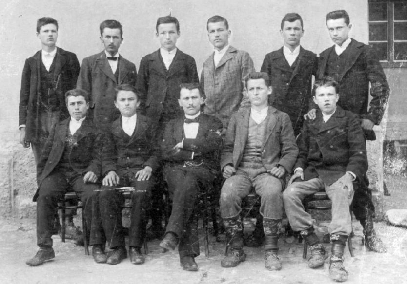 Članovi uprave đačke družine "Napredak", poznate kao "gnezdo socijalizma". Stoje (sleva nadesno): S. Hadžic, R. Dragovic, D. Tucović, S. Tucović, A. Lazarević i D. Derić. Sede: E. Gavrilović, M. Marković, P. Vujić, D. Šunderić.